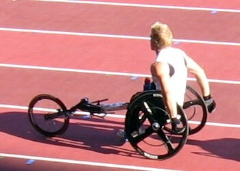 Leo-Pekka Tähti Kalevan kisoissa, Ratinan stadionilla, Tampereella, 26. heinäkuuta 2008